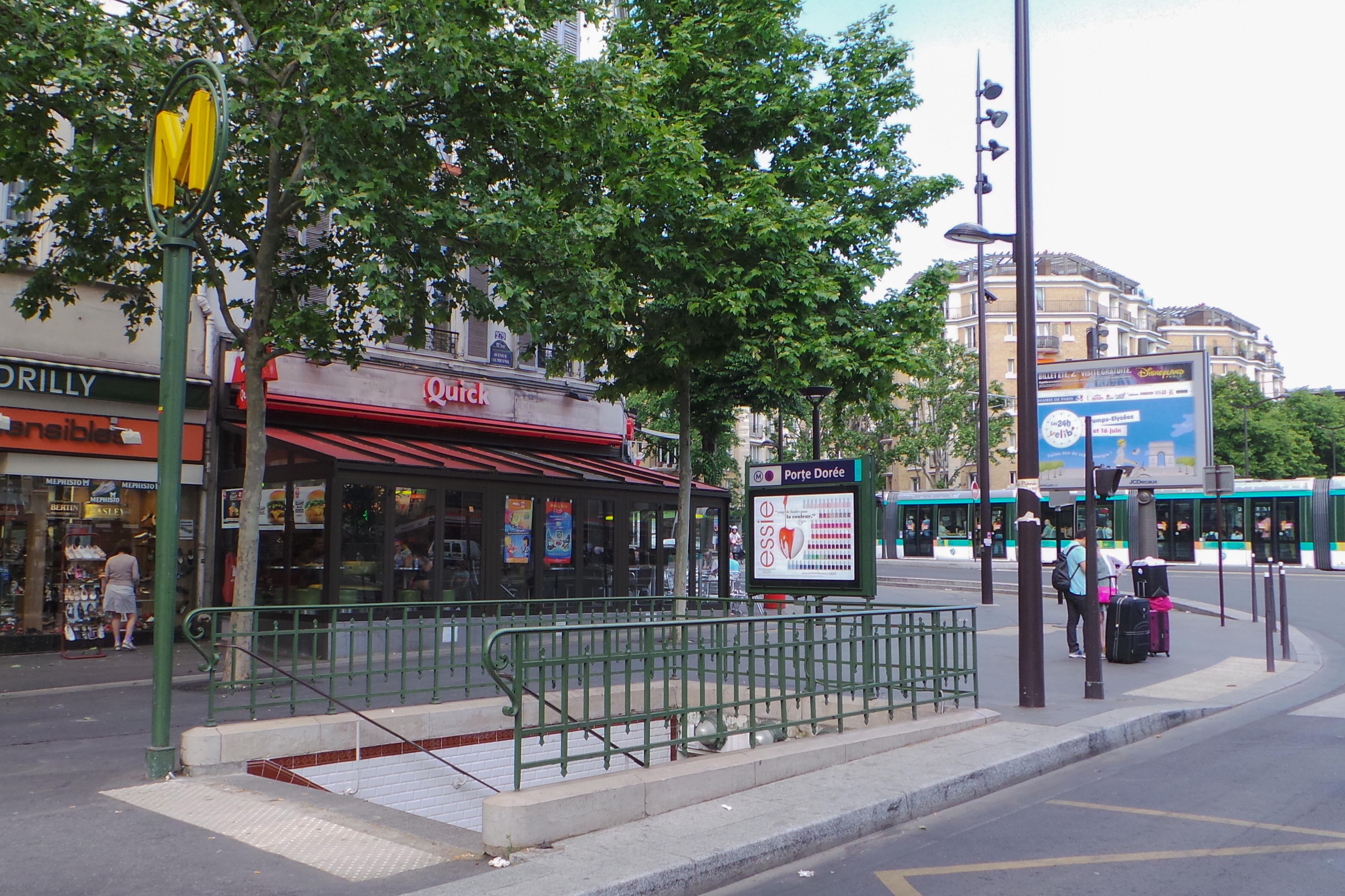 Station de métro Porte Dorée, ligne 8 du métro de Paris - Paris, France